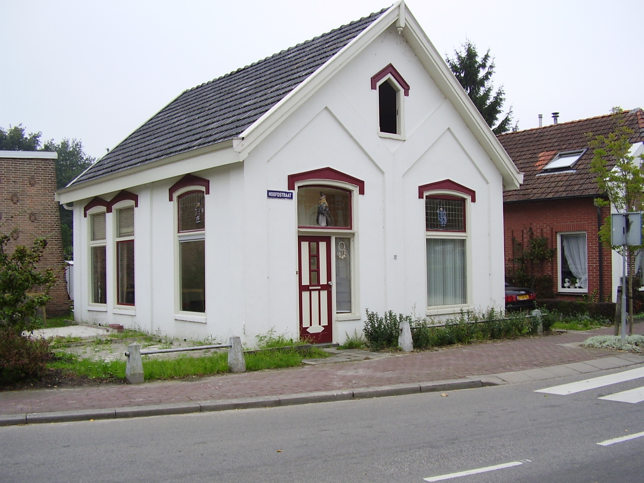 Het werd in 1882 gebouwd door Stoomtram-maatschappij Oldambt gebouwd die in 1884 werd opgeheven en overging in Stoomtram-maatschappij Oldambt -Pekela. De lijn Finsterwolde-Scheemda werd opgeheven en dit station werd niet meer bediend. Later heeft Oostelijk Groningen hier wel een lijn langs gelegd, maar daarvoor werd dit station niet gebruikt. OLYMPUS DIGITAL CAMERA